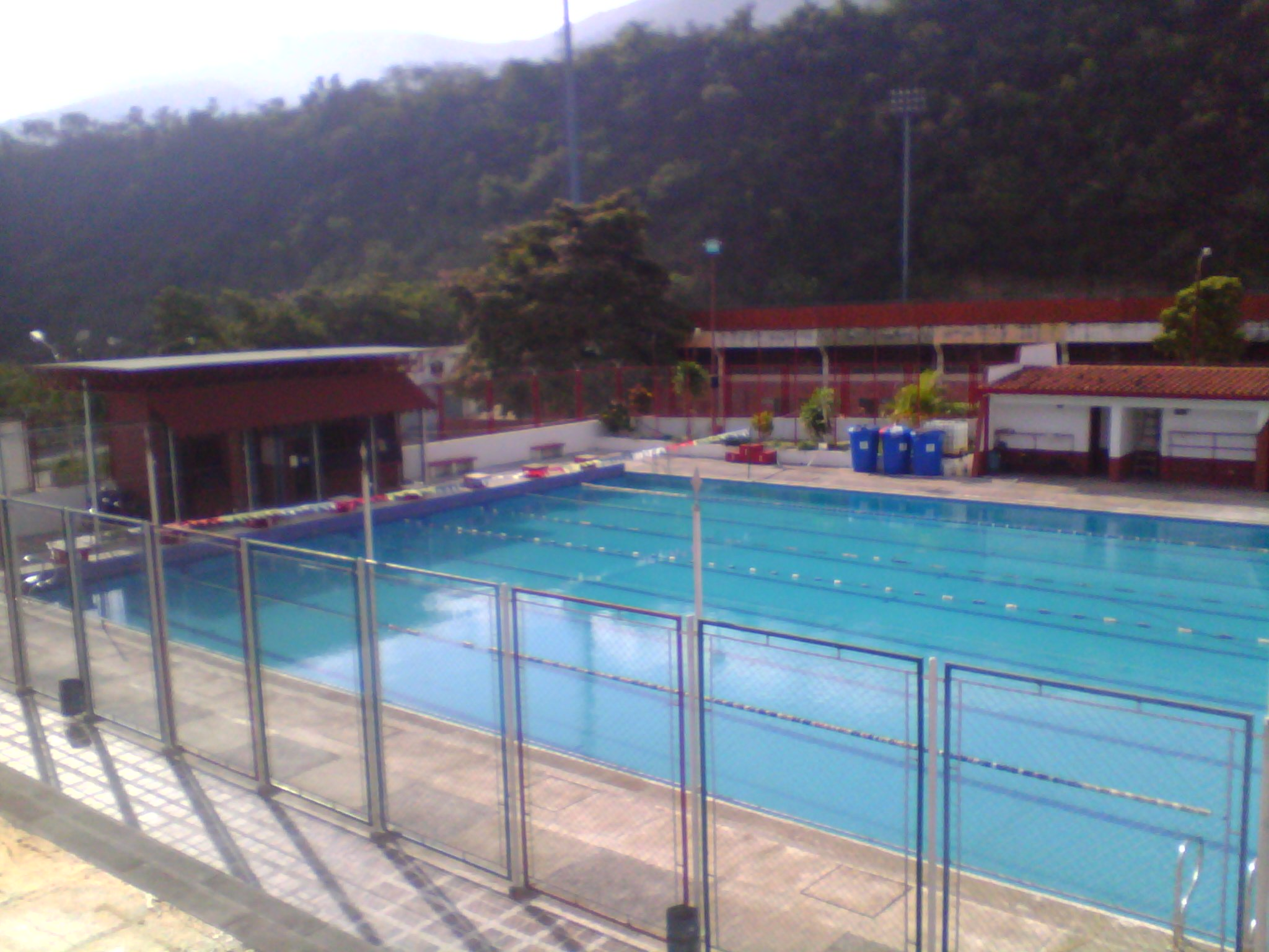 tovar